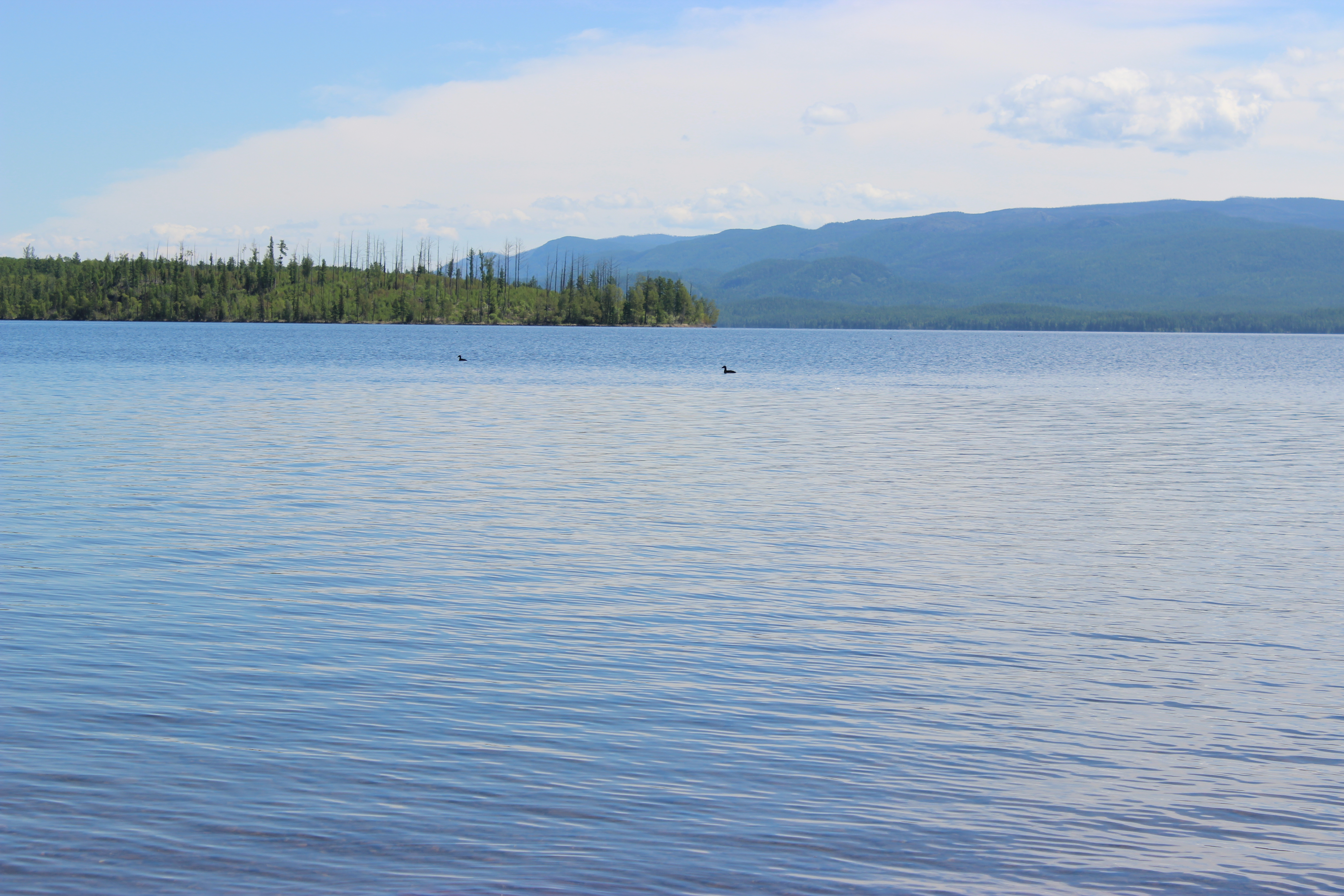 озеро Азас в самом сердце Тоджи